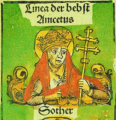 Св. Аникет, папа Римский. Раскрашенная гравюра. (Н. Schedel. «Liber chroniсarum». 1493)